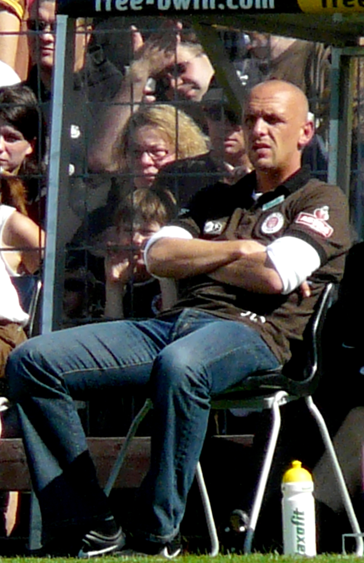 Holger Stanislawski